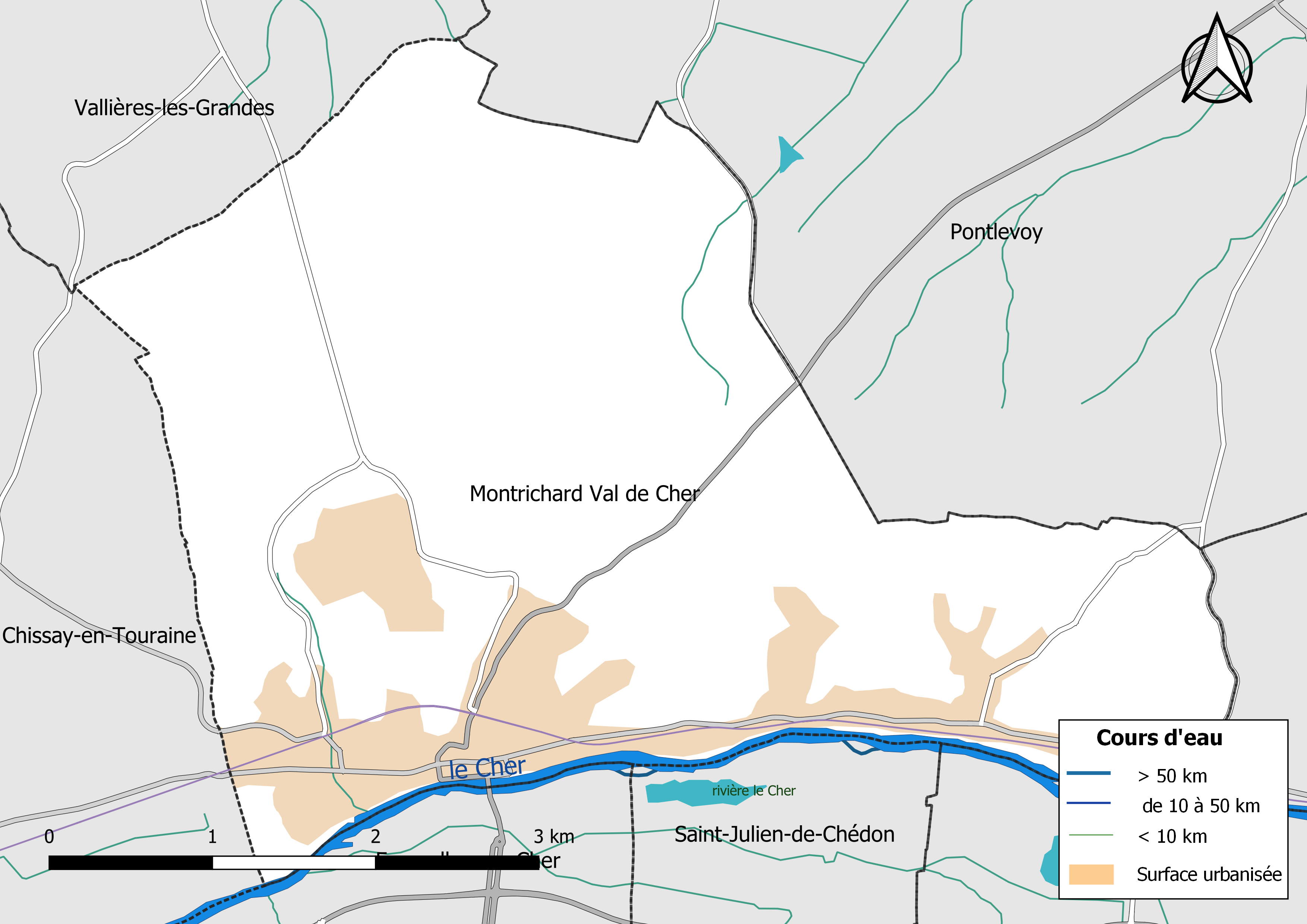 Carte du réseau hydrographique de la commune de Montrichard Val de Cher (Loir-et-Cher, France).